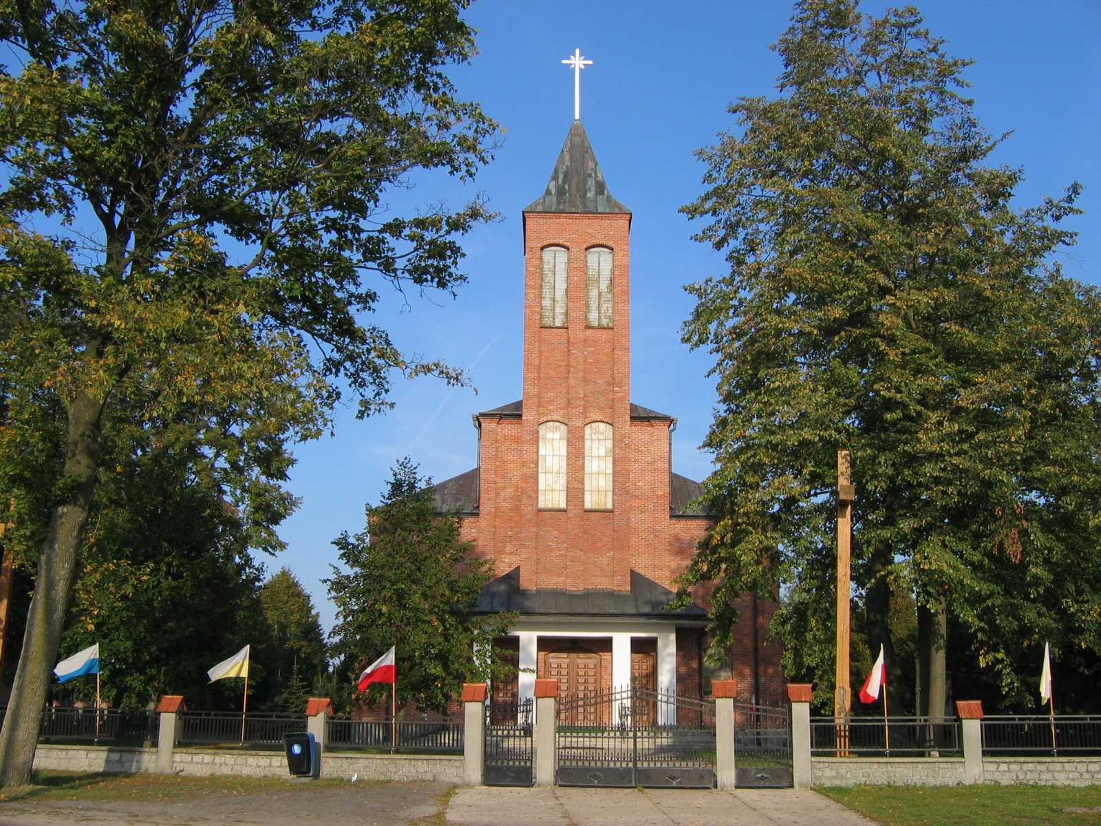 kościół we wsi Łukowce koło Białej Podlaskiej